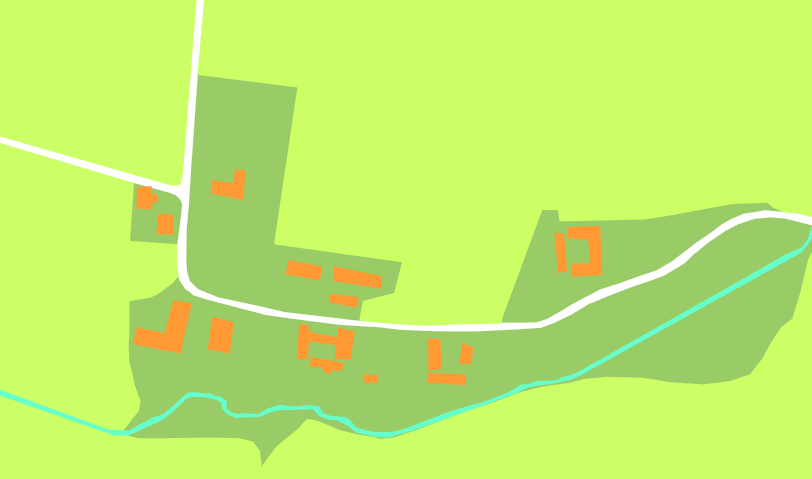 Karta över Lilla Bjällerup. Egenproduktion efter flygbild.